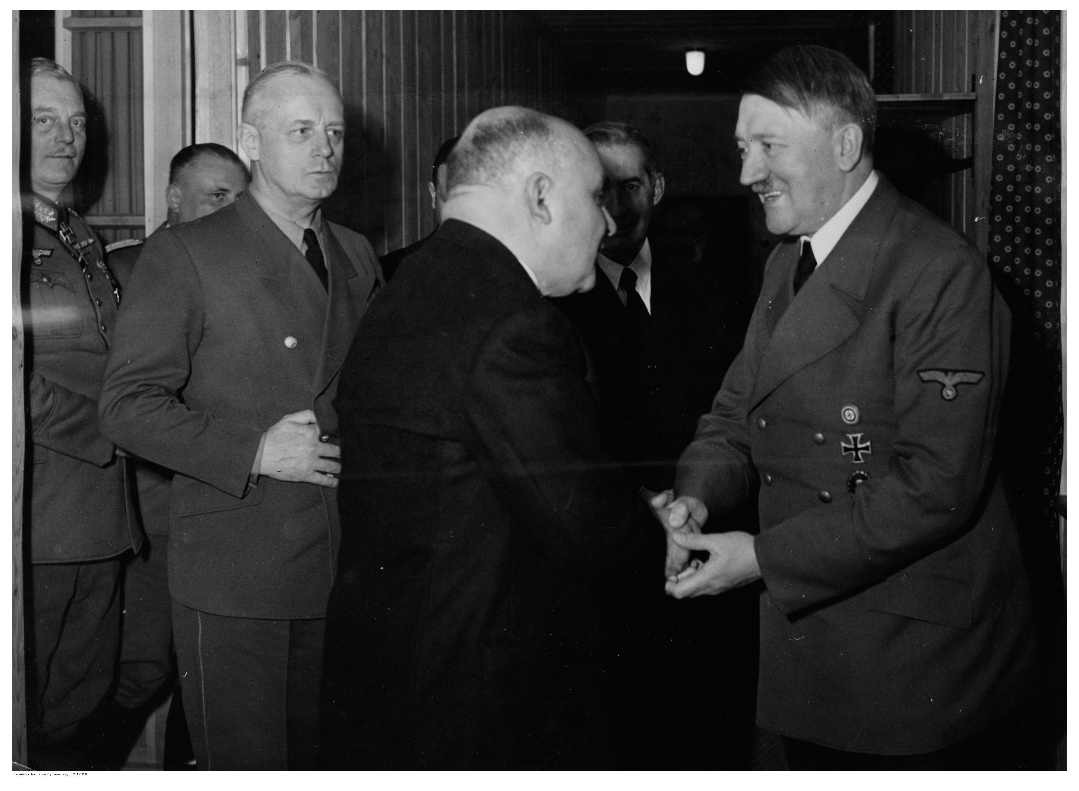 Добри Божилов на среща с Адолф Хитлер, на снимката присъстват и фелдмаршал Вилхелм Кайтел (на заден план, в ляво), Йоахим Рибентроп (на заден план, в средата) и Димитър Шишманов (между Божилов и Хитлер).